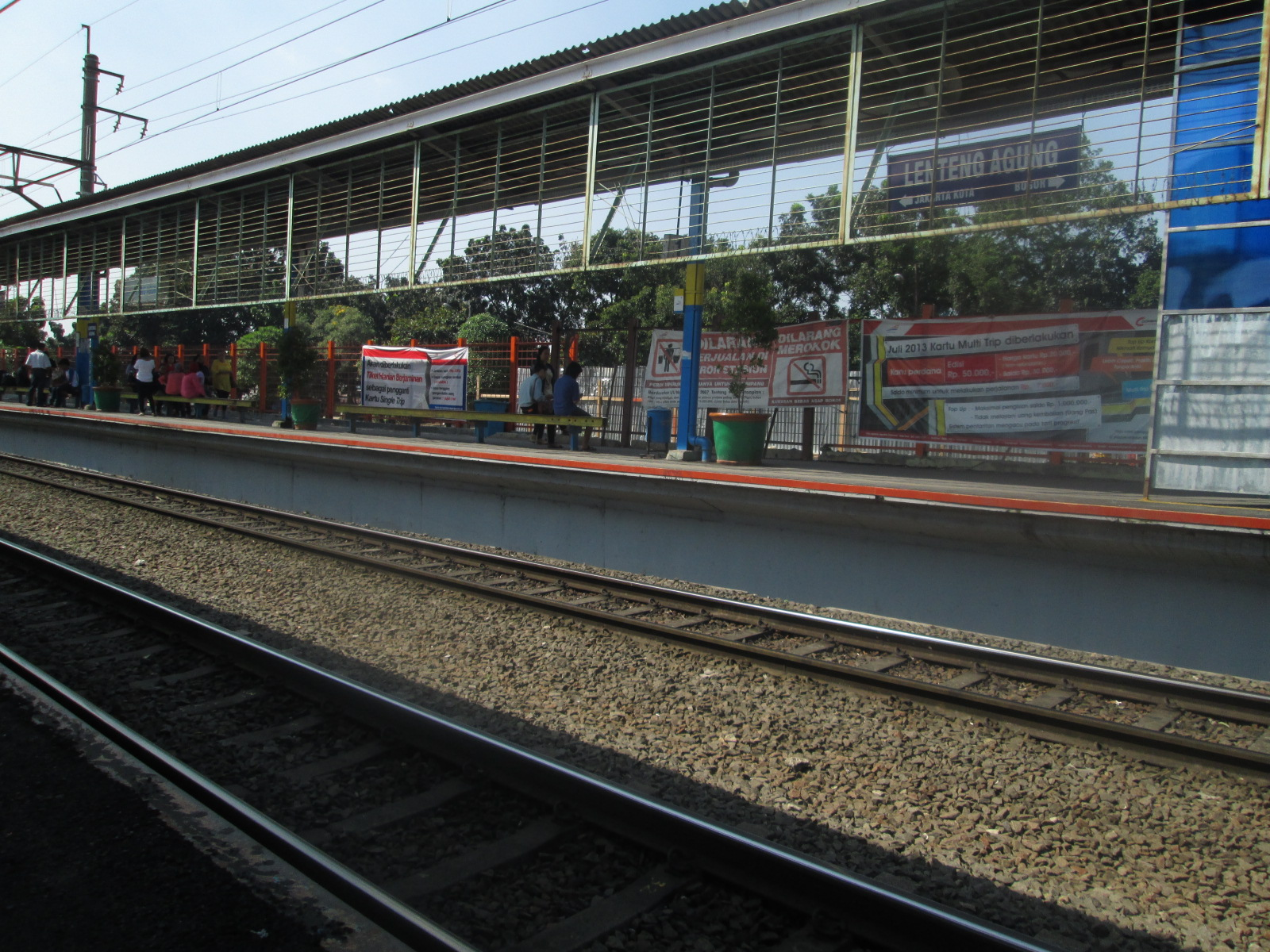 Stasiun Lenteng Agung